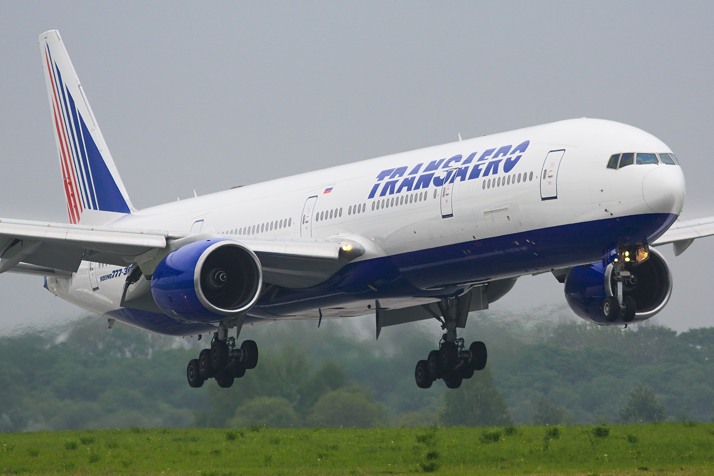 Boeing 777-300 of Vladivostok Air at Vladivostok Airport